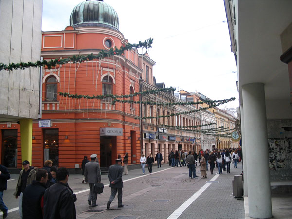 Gospodska ulica, Banja Luka, Republika Srpska (BiH)